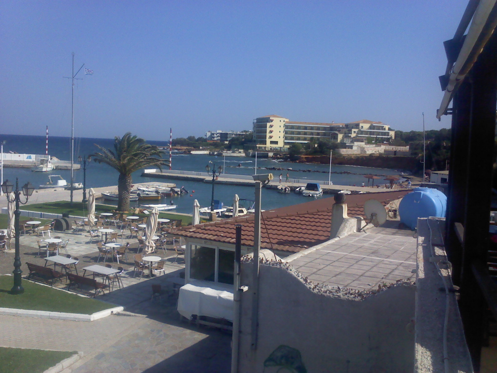 Mati Attika view